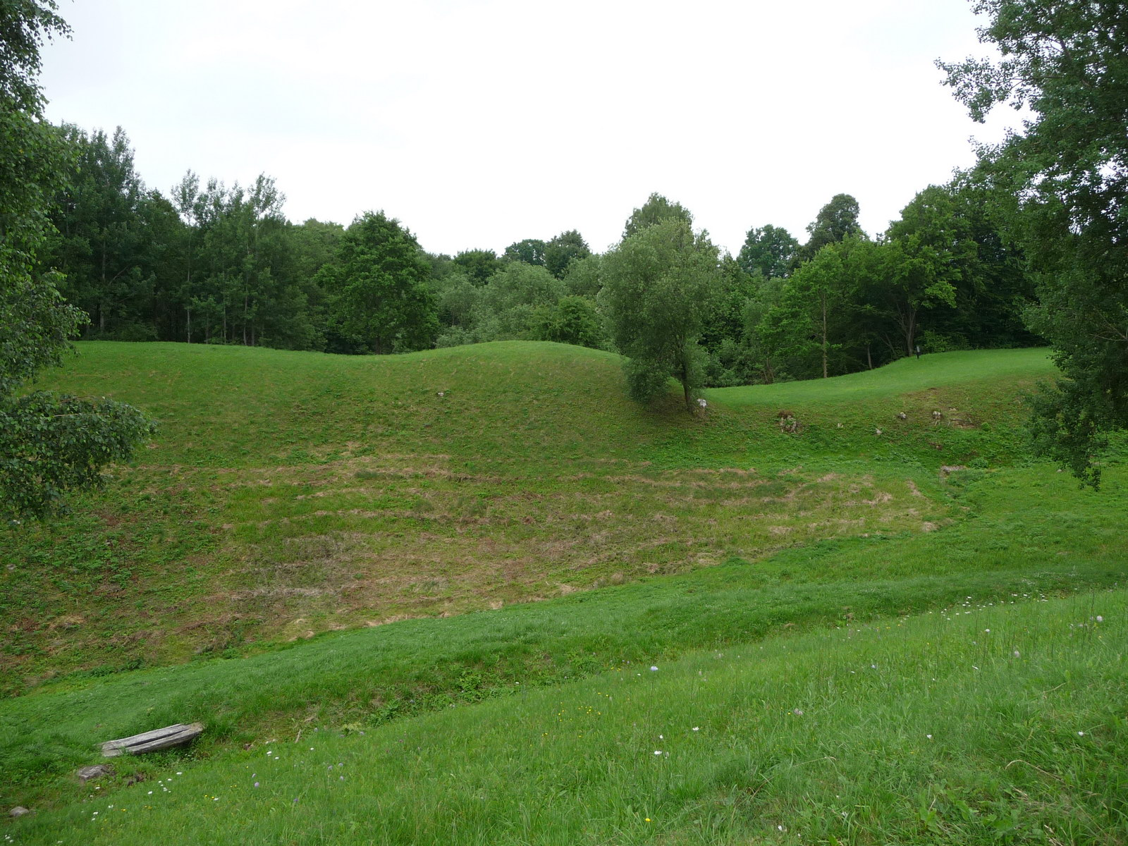 Balnakalnis